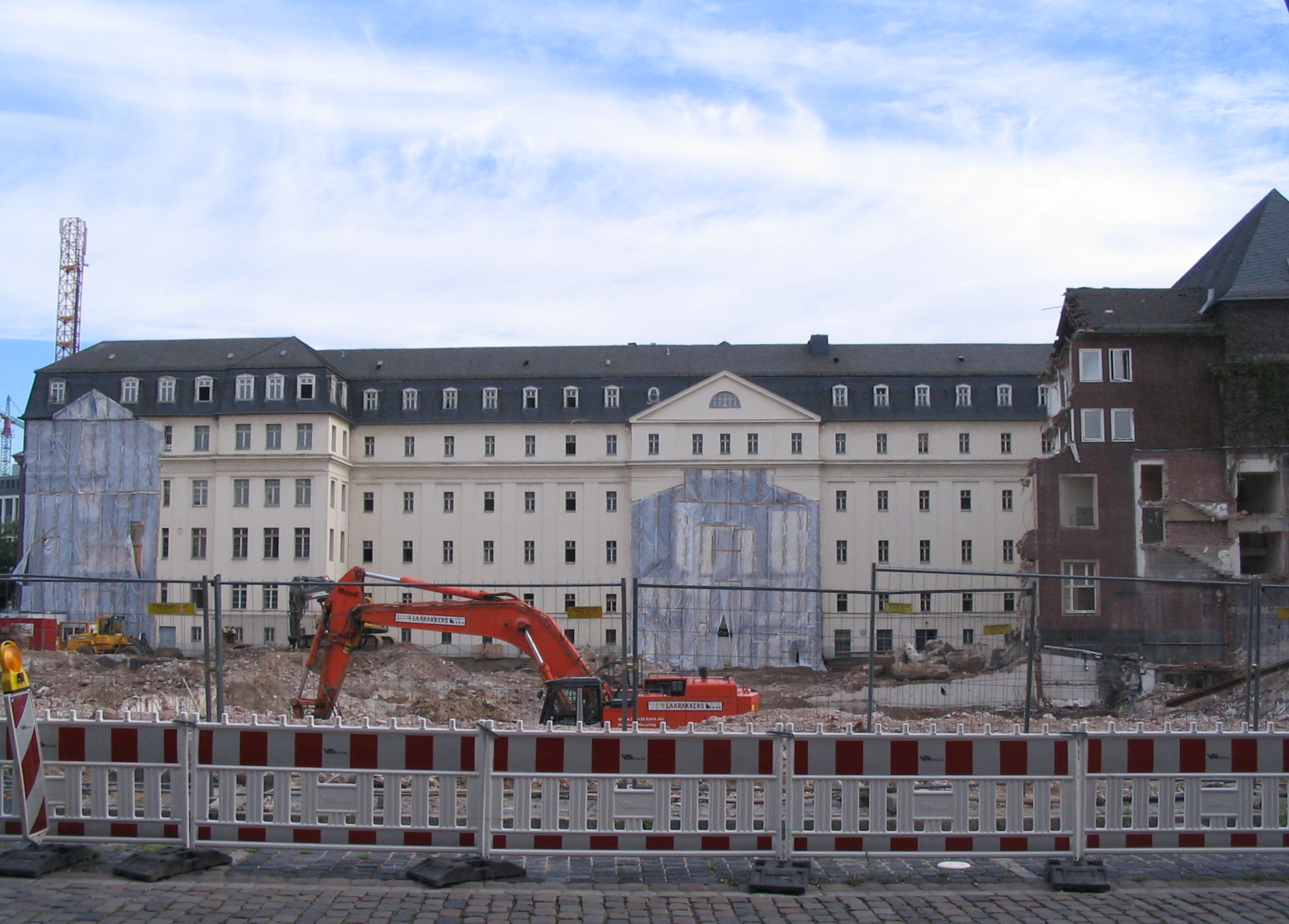 Düsseldorf, Ratinger Straße. Blick auf die Rückseite des ehemaligen Landgerichts nach Abriss des hinteren Gebäudekomplexes.